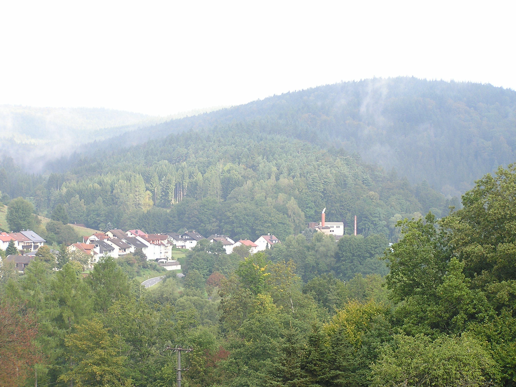 Waldschloss-Brauerei in Frammersbach (Landkreis Main-Spessart, Unterfranken, Bayern, Deutschland) vom Bäckersberg im Hintergrund der Wellberg